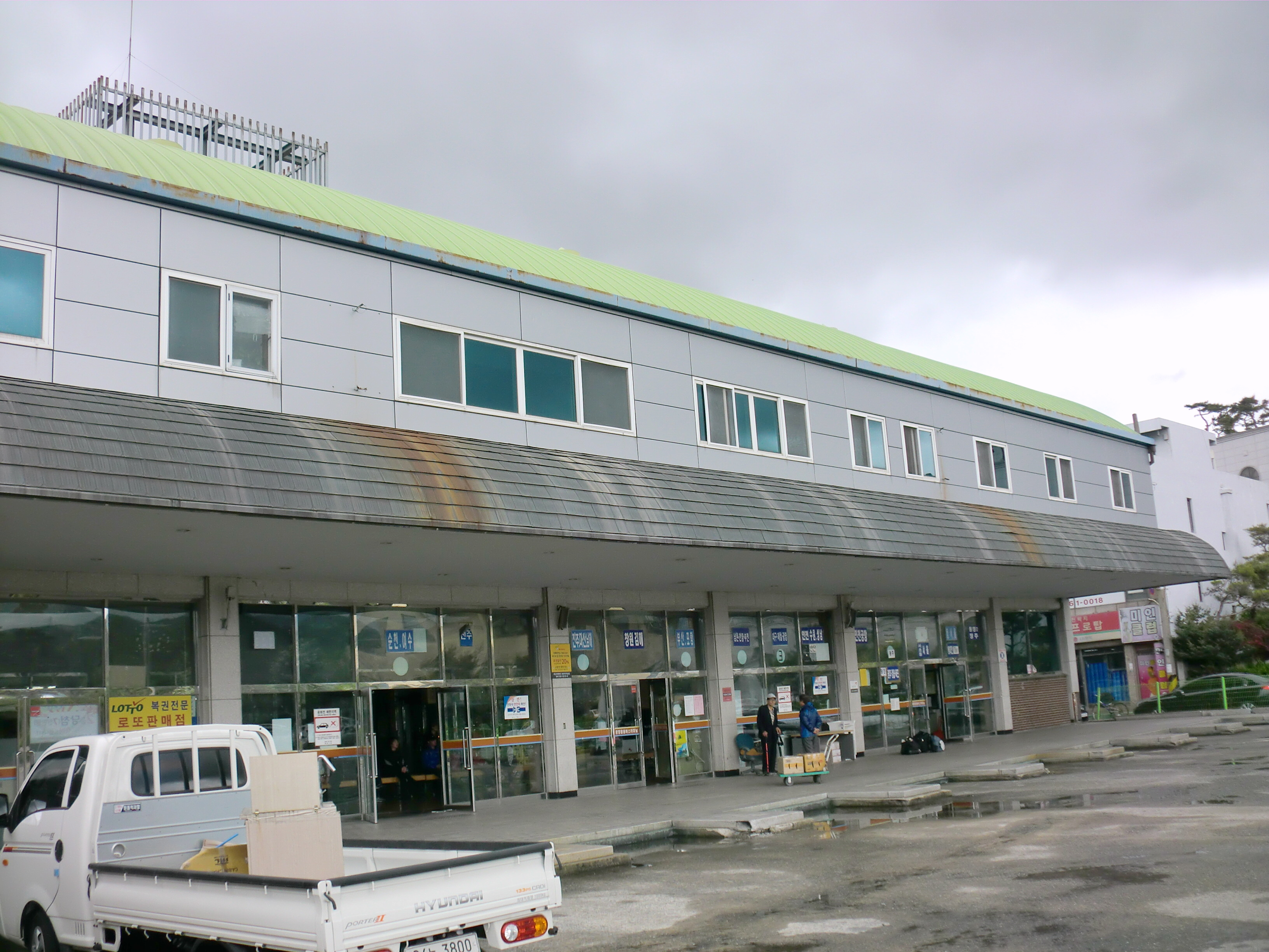 전라남도 광양시에 있는 광양시외버스터미널